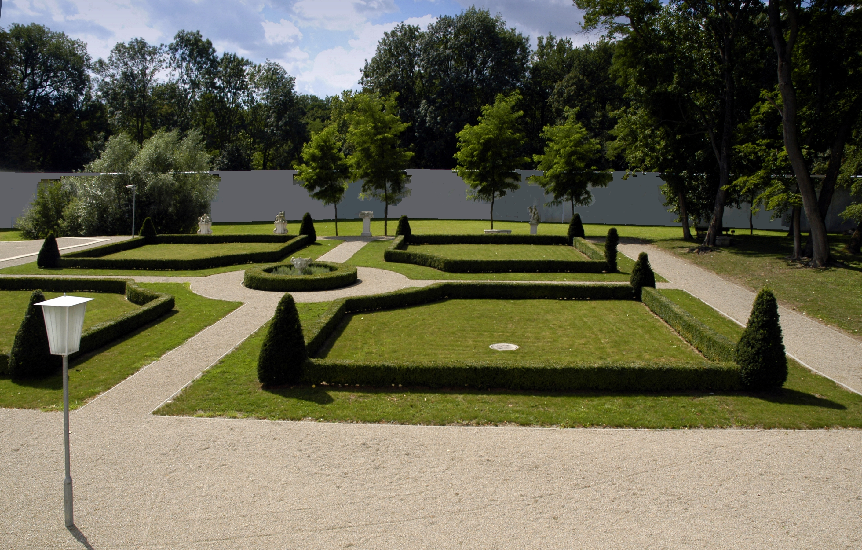 ehemaliges Schloss Sonnberg, Justizanstalt, Barockgarten an der Südseite des Schlosses (retuschierte Aufnahme/Sicherheitseinrichtungen unkenntlich gemacht)